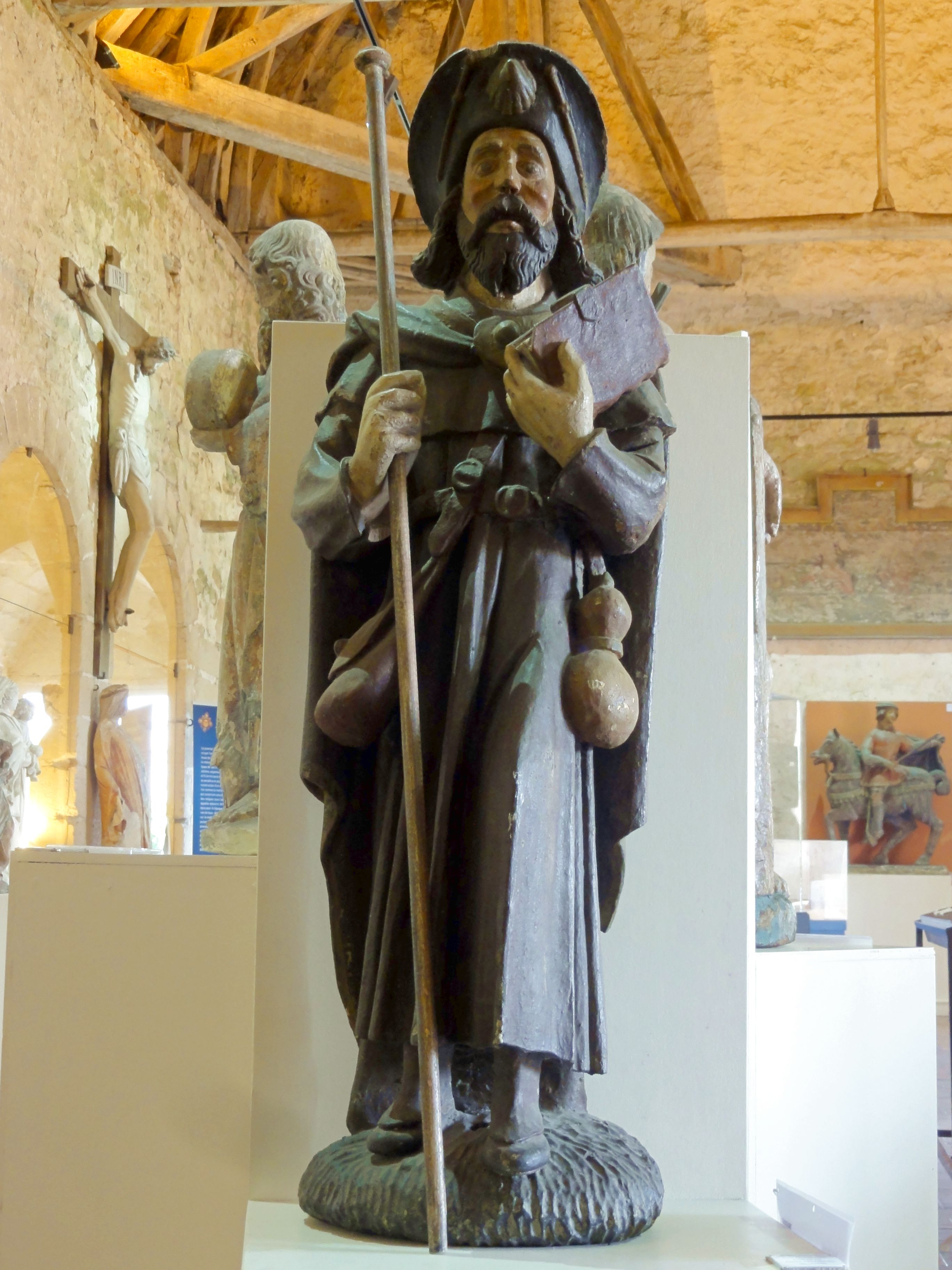 Voir titre.